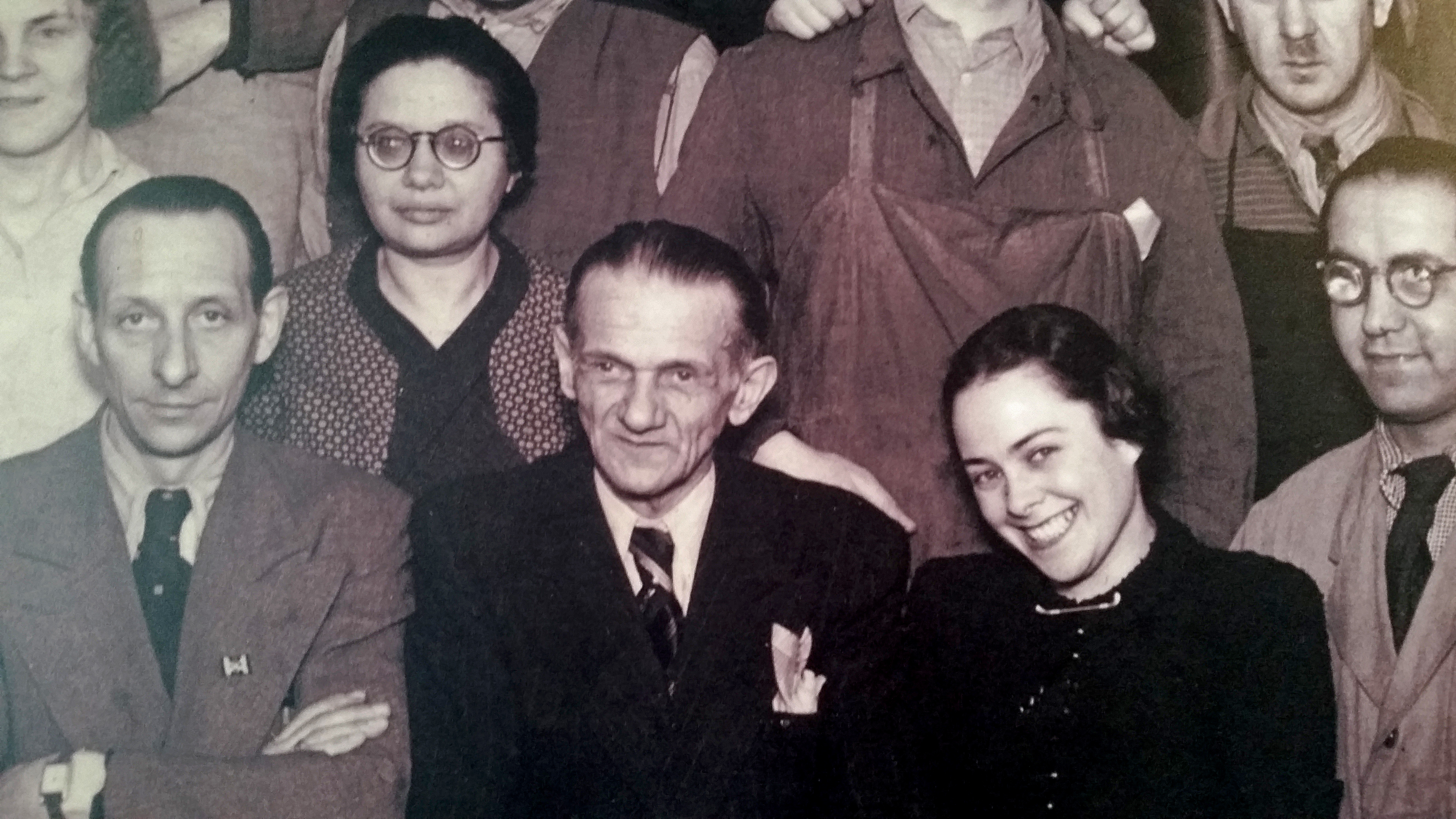 תמונתו של אוטו ויידט במרכז במוזיאון הנמצא בבית ששם שכן המפעל שבו העסיק יהודים ברחוב רוזנטאל 39 ברלין. ויידט מימין